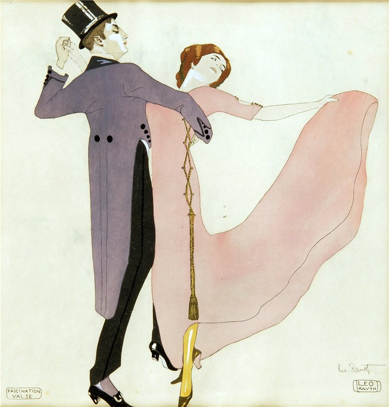 Fascination Valse